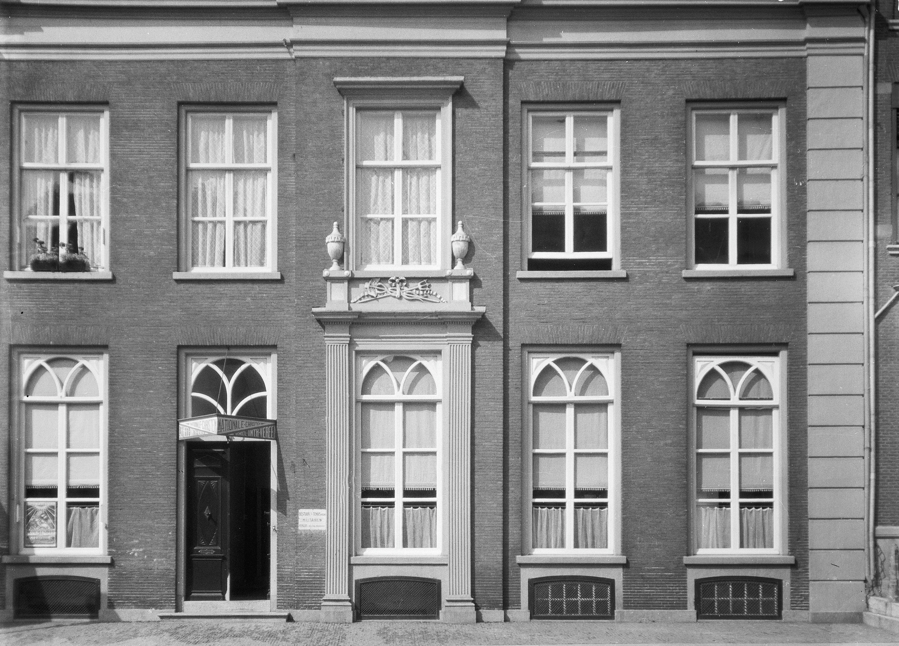 voorgevel